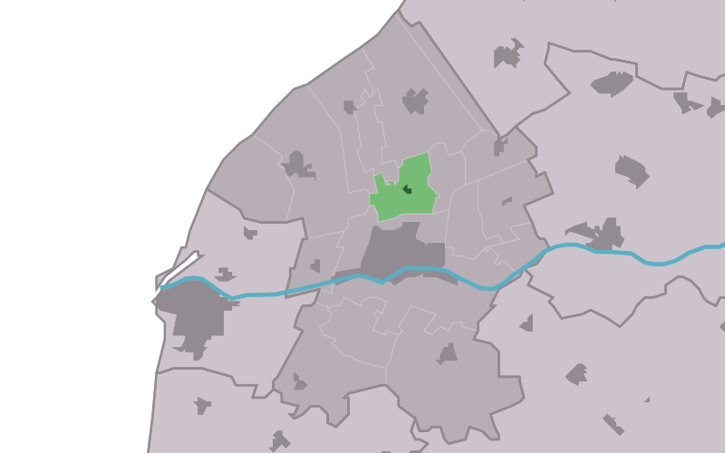 Kaartsje fan himrik fan Achlum